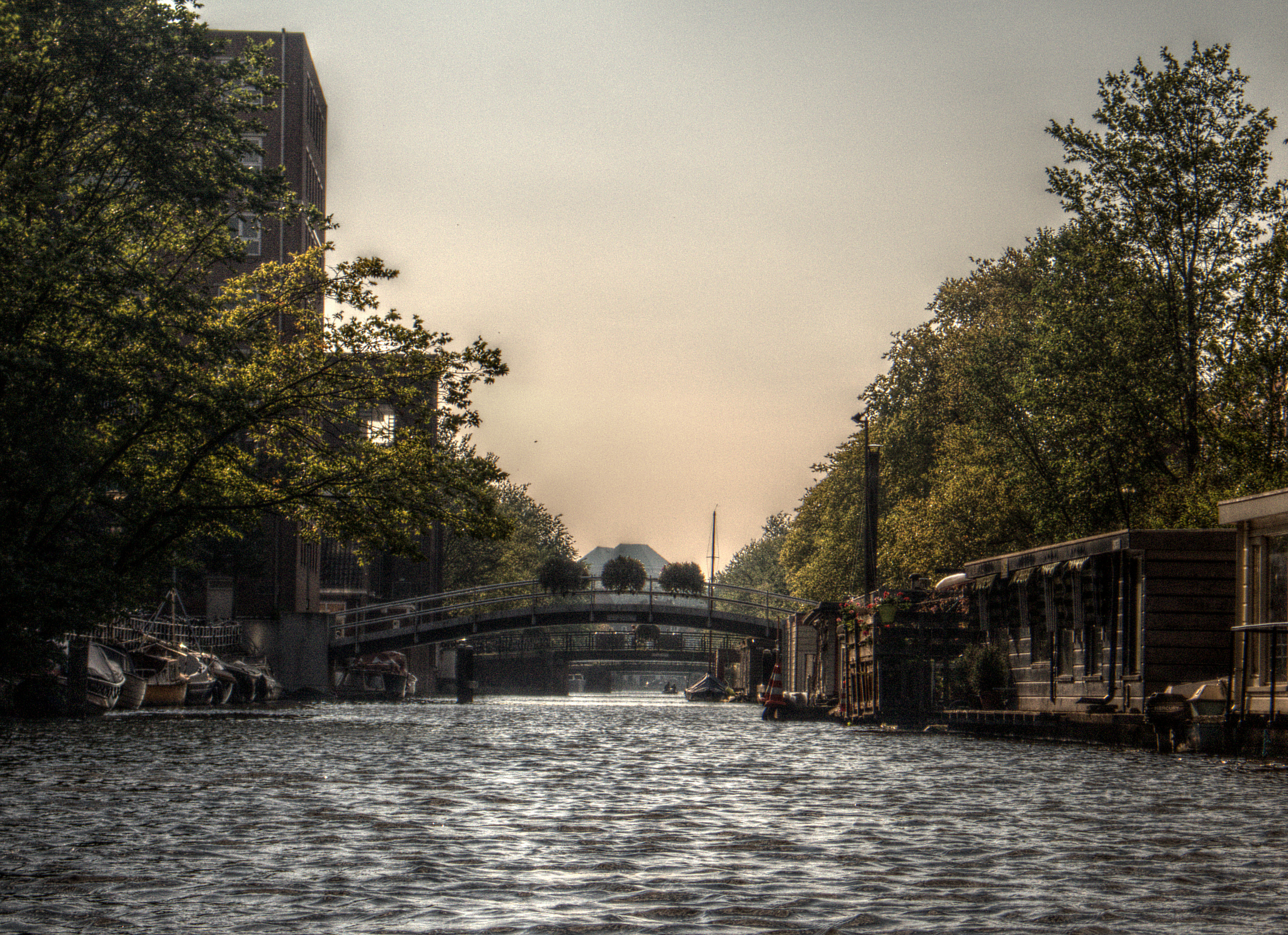 Het Jacob van Lennepkanaal met Ketelhuisbrug gezien naar de Kostverlorenvaart met links enkele gebouwen van het voormalige Wilhelminagasthuis, september 2013